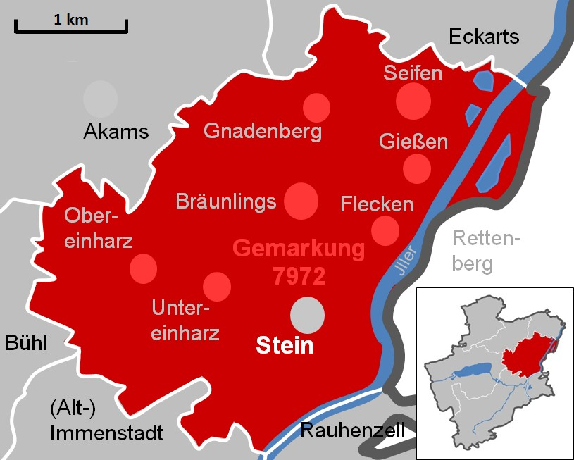 Immenstadt Gemarkung 7972 Stein - erstellt mit MS-Excel